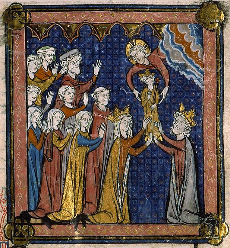 Naissance de Philippe Auguste. Enluminure des Grandes Chroniques de France, Bibliothèque Sainte-Geneviève, Ms. 782, folio 280.